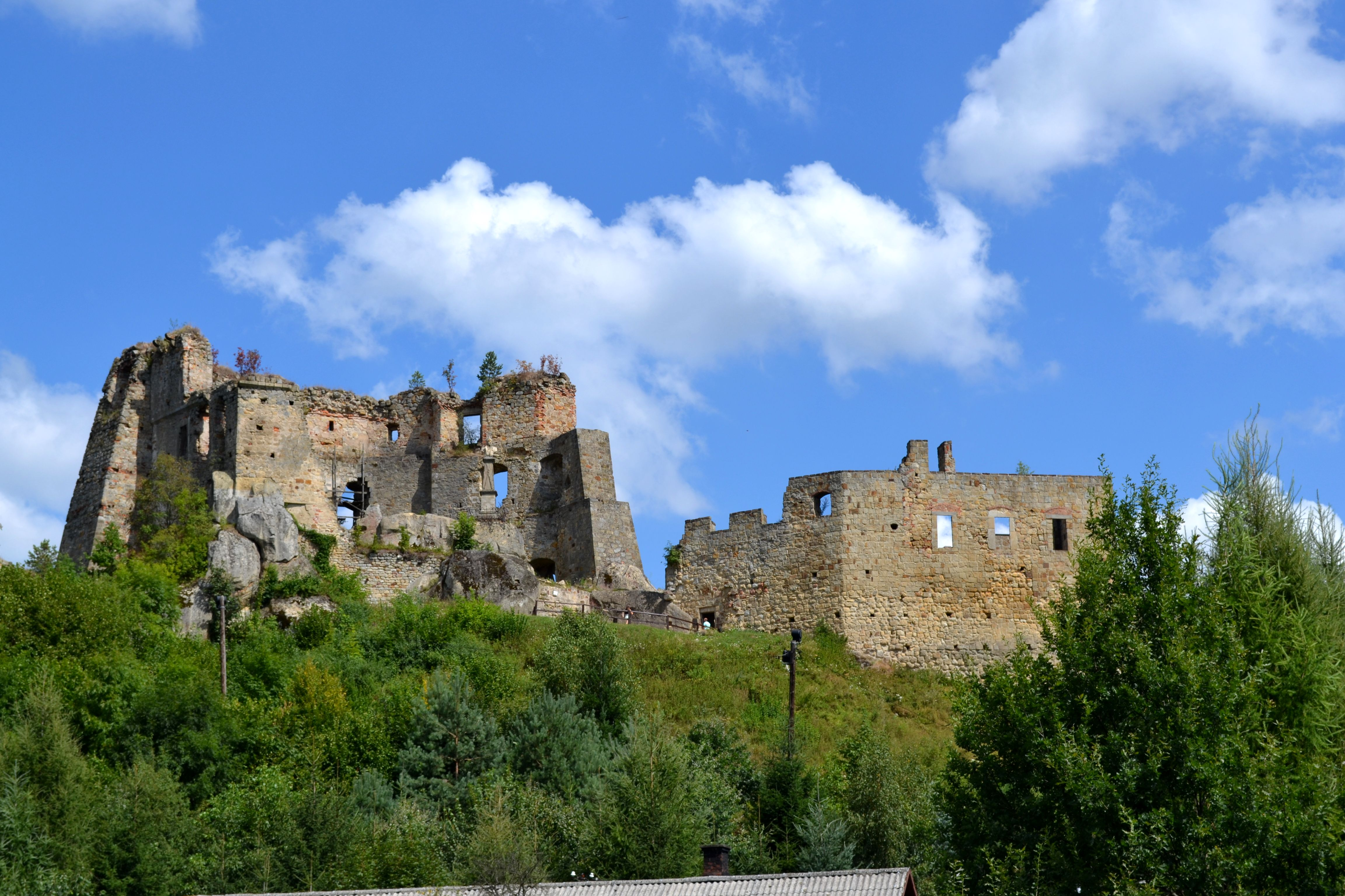 Odrzykoń, ruiny zamku KAMIENIEC (ze wzgórzem zamkowym), XIV